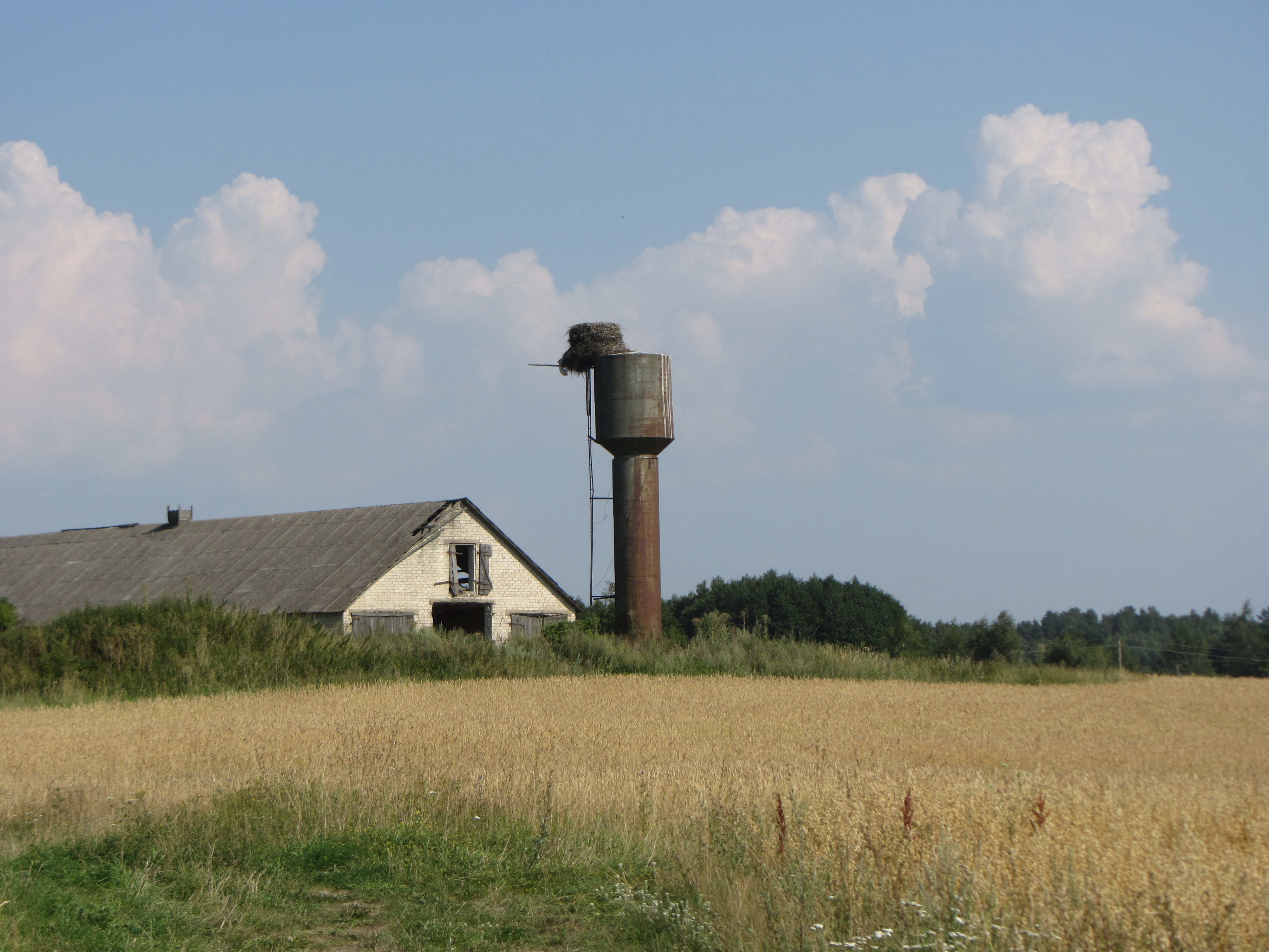 Mikabaliai 67257, Lithuania